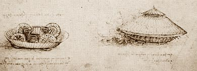 Бронированный фургон (рисунок Леонардо да Винчи)